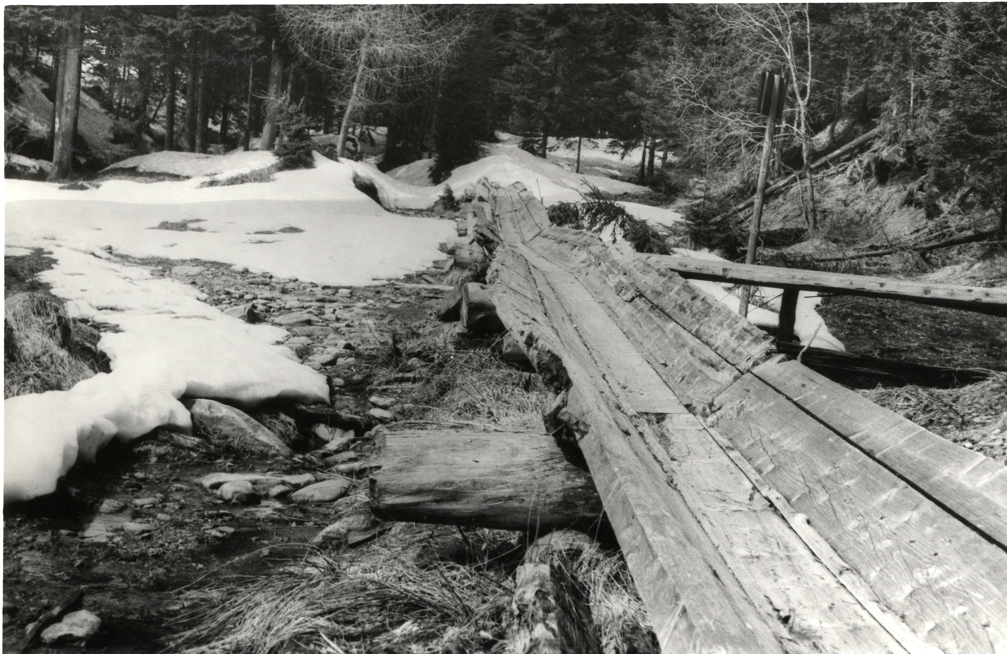 Lesena drča za transport lesa.